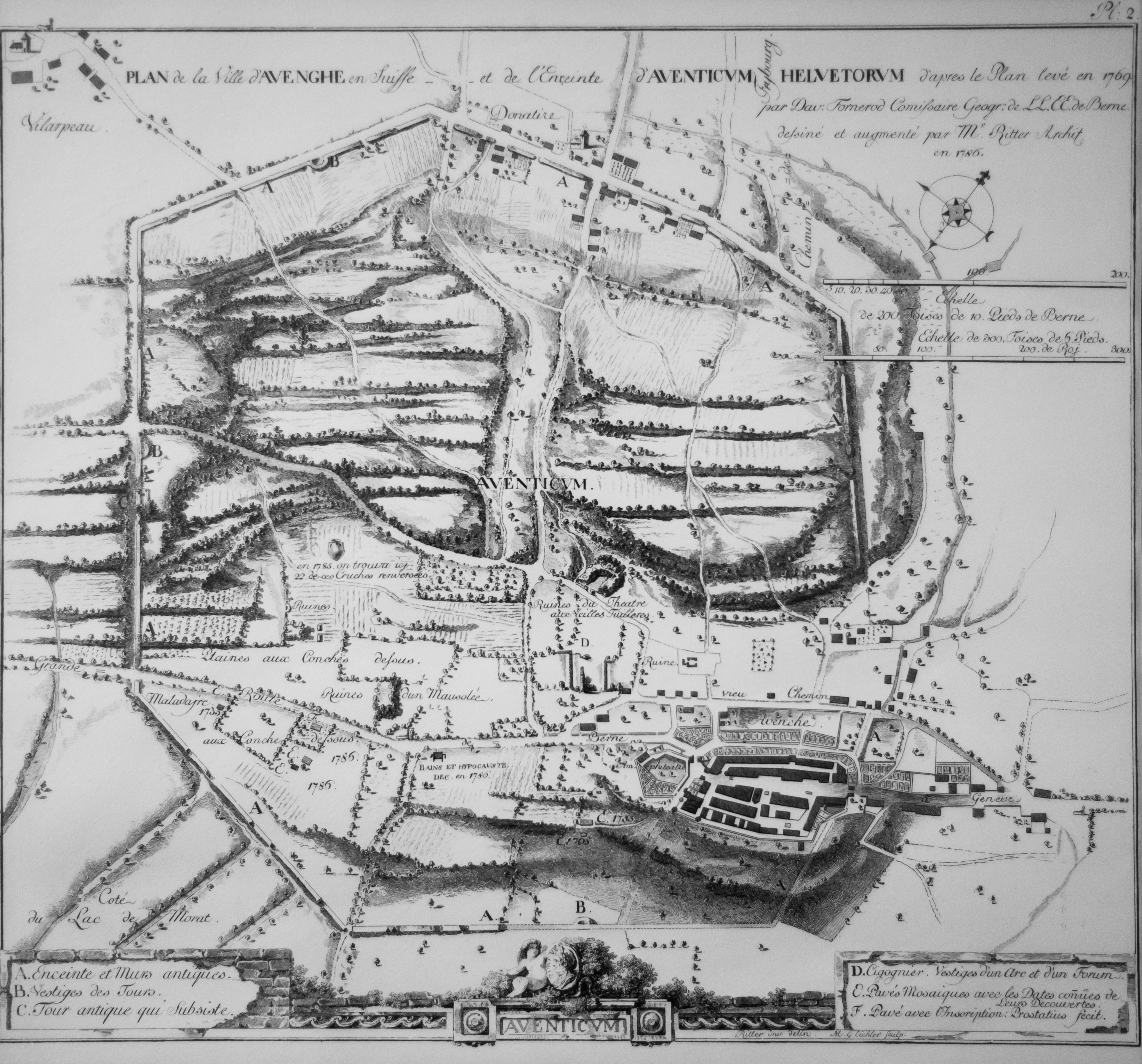 Jeunes femmes présentant des fleurs (ancien titre)